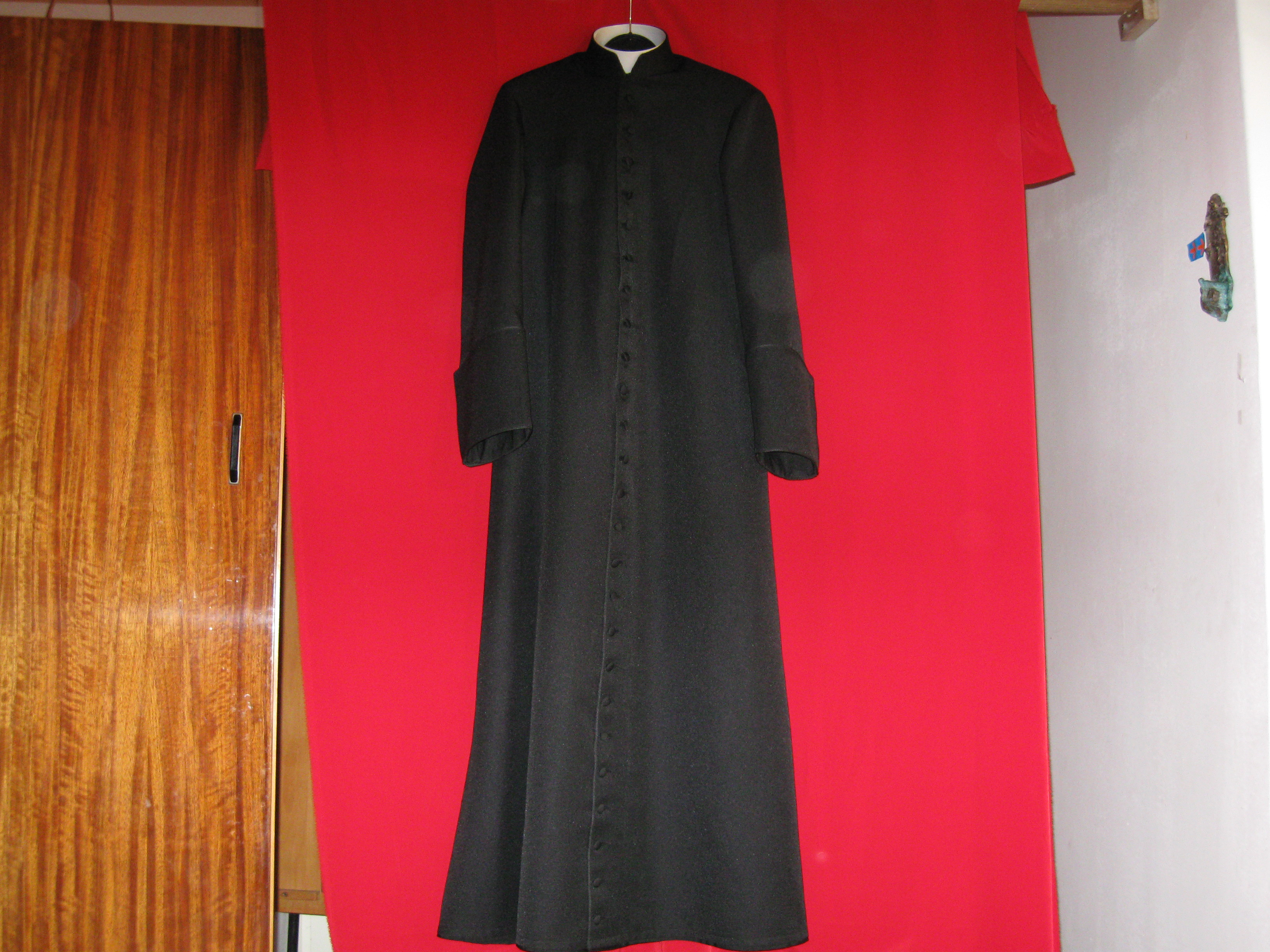 Római katolikus papi reverenda